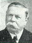 Don Juan Alais (1844-1914), músico argentino de ascendencia anglo-francesa